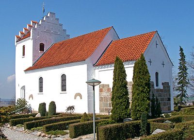 Skejby Kirke i det nordlige Århus, Denmark